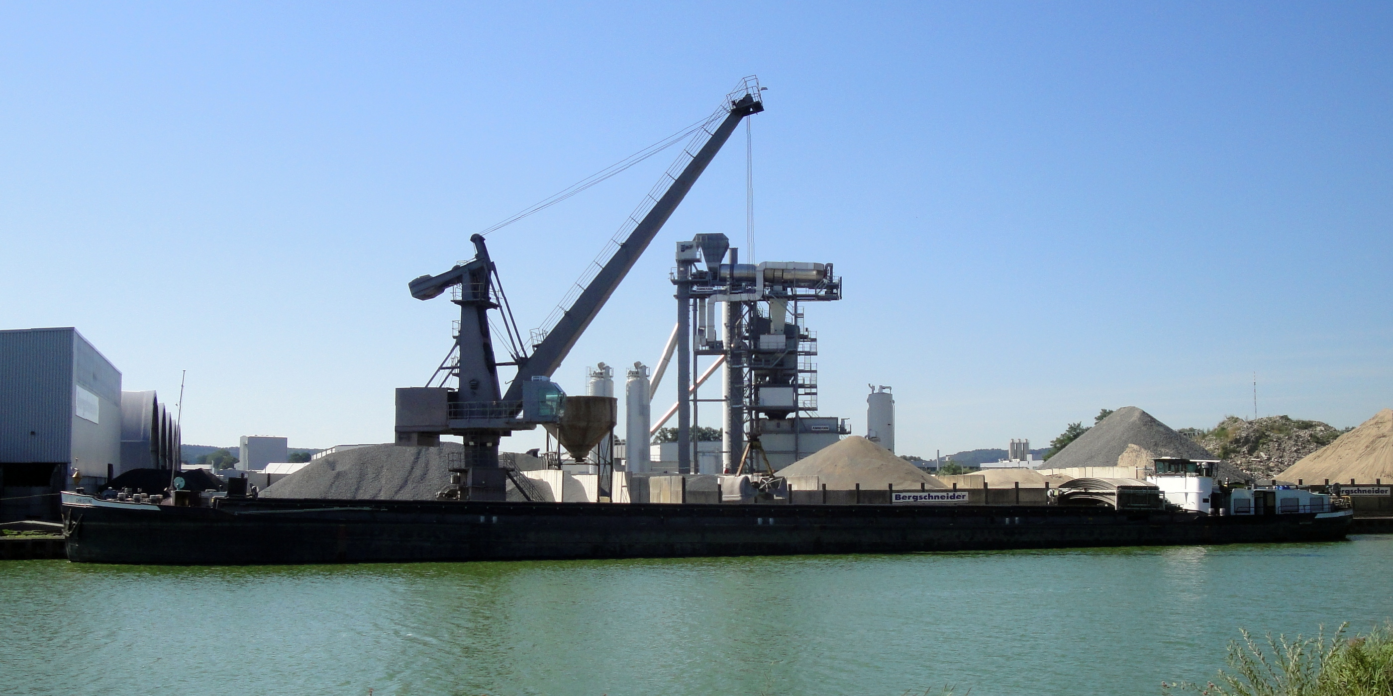 Christine (ENI: 04001570) auf dem Mittellandkanal im Hafen Engter (Albert Bergschneider GmbH)